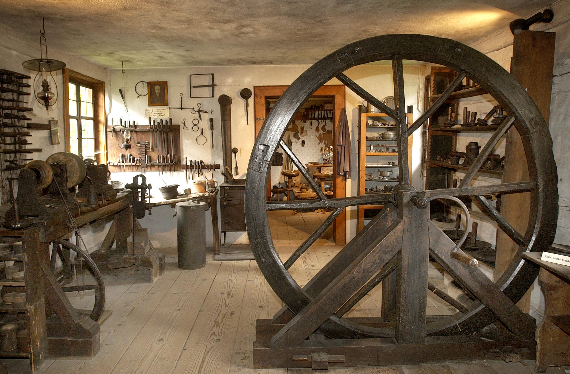 Feuchtwanger Handwerkerstuben Feuchtwangen Feuchtwangen